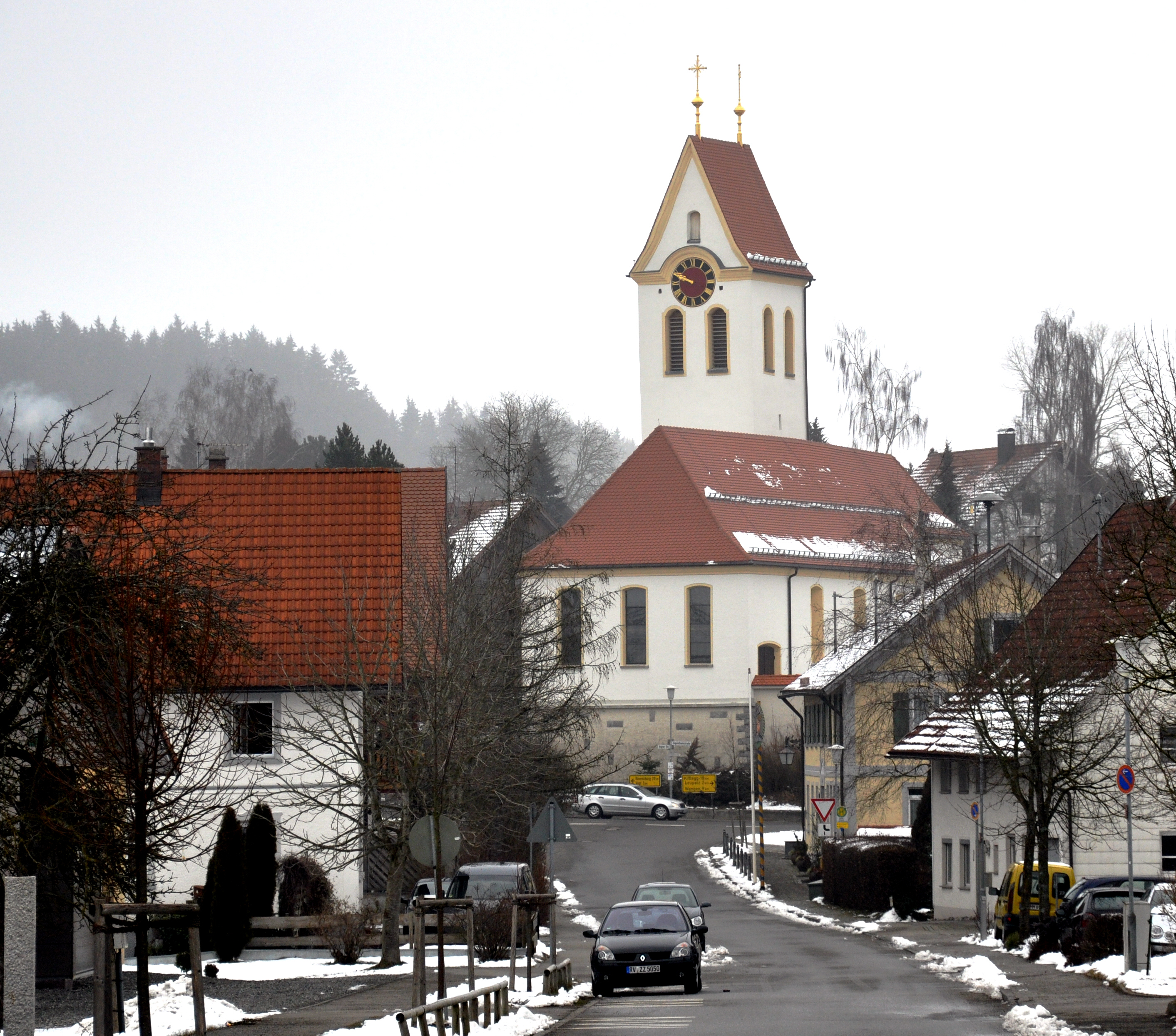 Karsee (Stadt Wangen im Allgäu), Blick zur Pfarrkirche St. Kilian